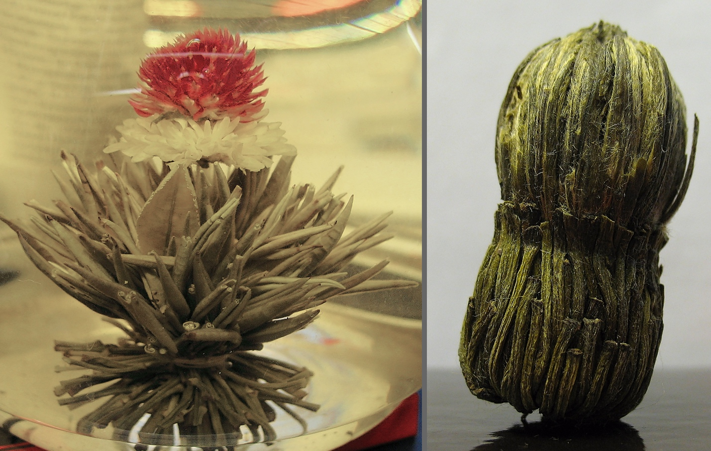 Teerose mit Blüte: links offen, rechts geschlossen